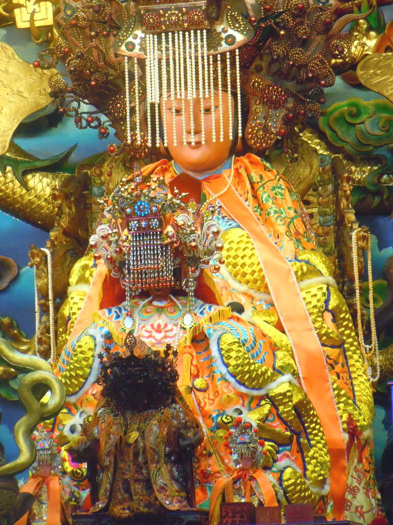 中文(繁體):白馬峰普天宮的所在地:彰化縣芳苑鄉芳漢路芳二段161巷。